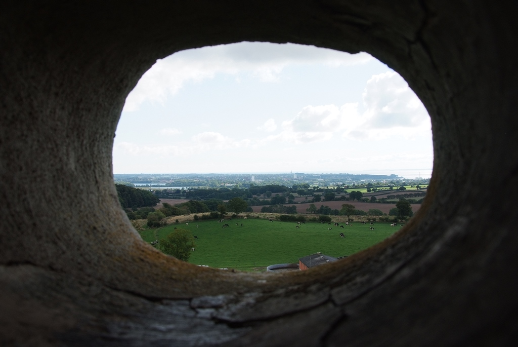 Blick durch eine der vier Luken des Gömnitzturms auf Neustadt